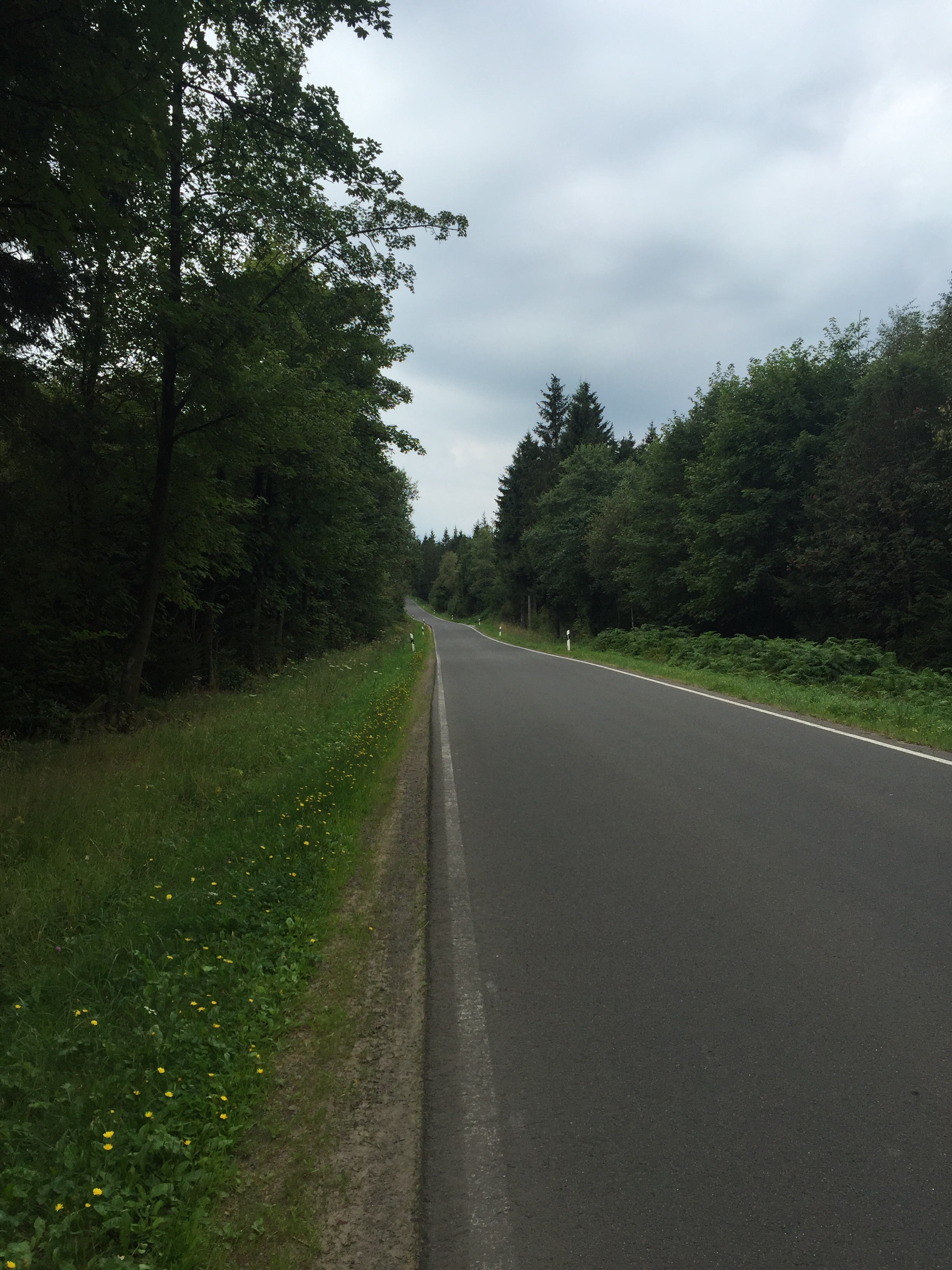 Parte del camino junto a la carretera en el área de Schwarzer Mann